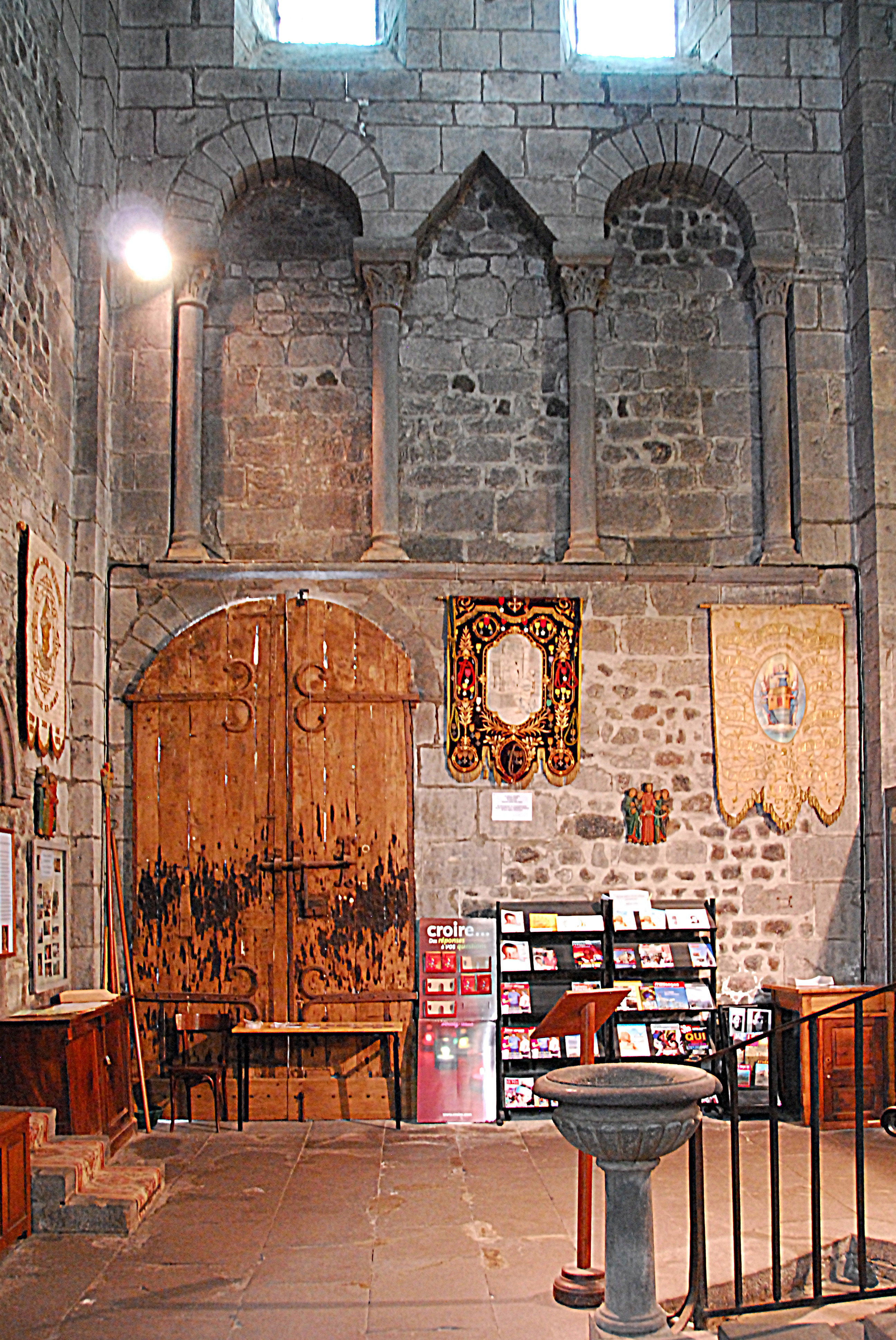 N.-D. d'Orcival, nördl. Querhausarm